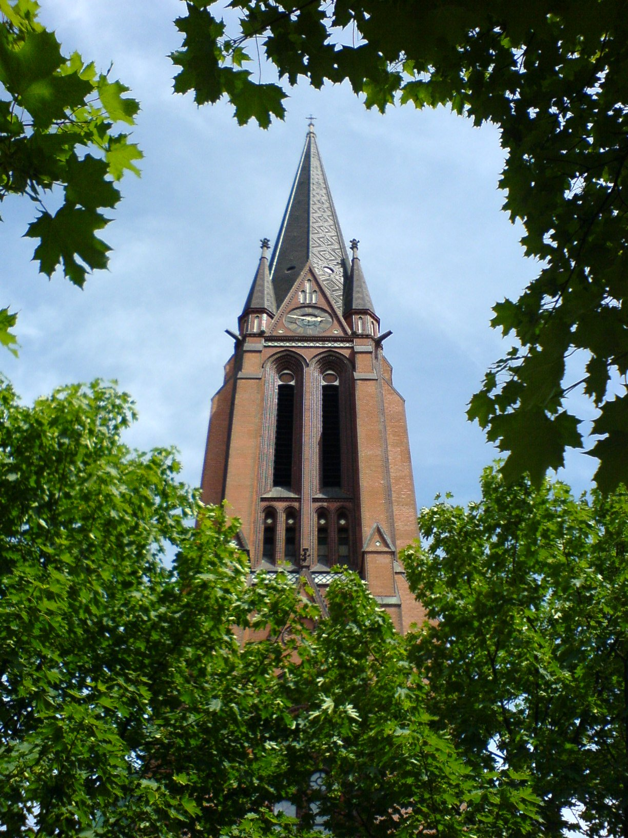 Bildbeschreibung: ... Fotograf/Zeichner: PodracerHH 21:56, 18. Jun 2006 (CEST) Datum: 062006 Sonstiges: ...